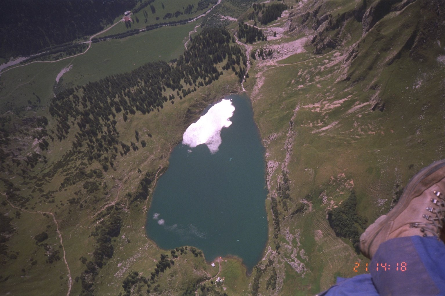 Seealpsee vom Gleitschirm